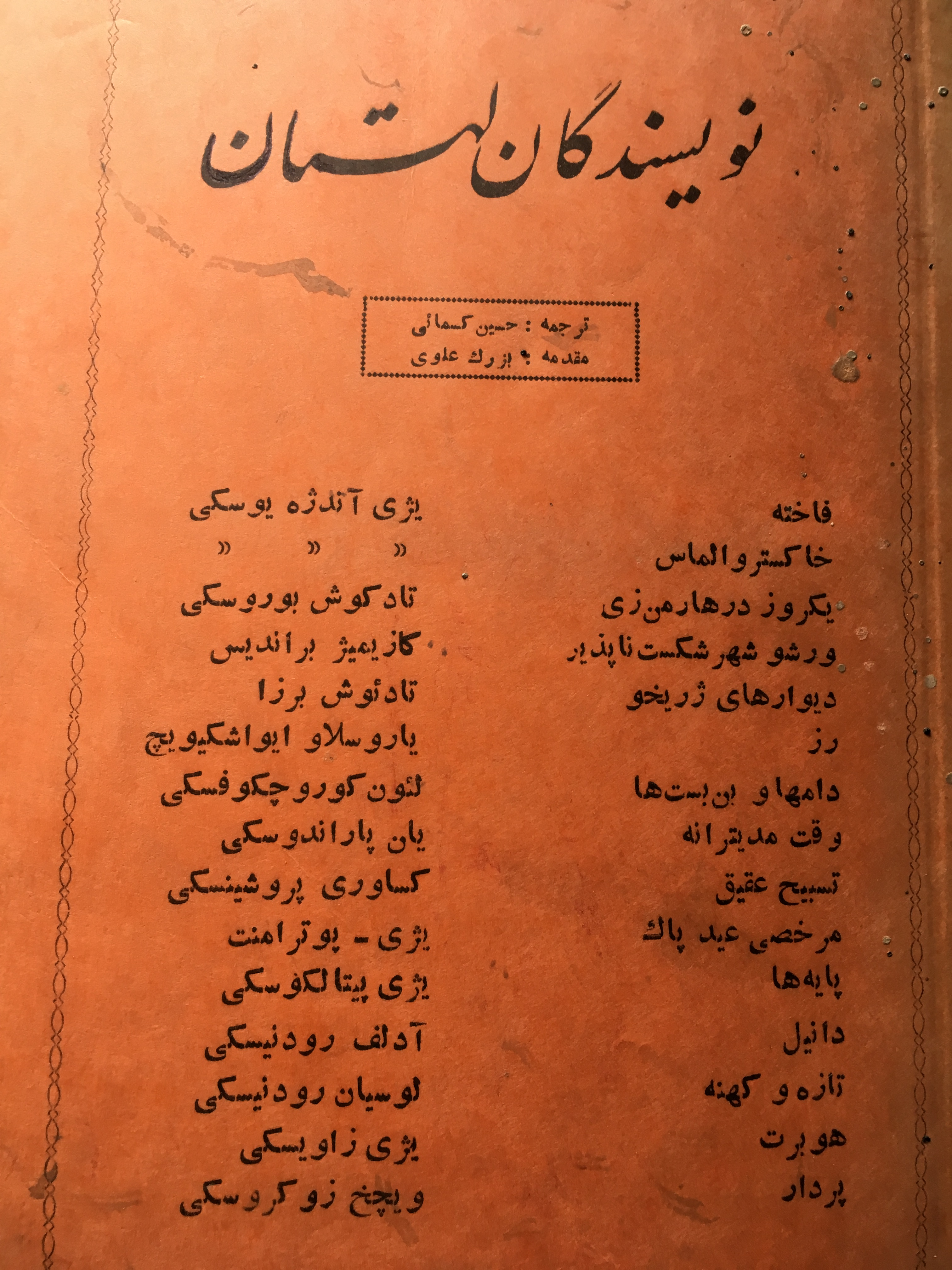 Les écrivains polonais par Hossein Kasmaï.